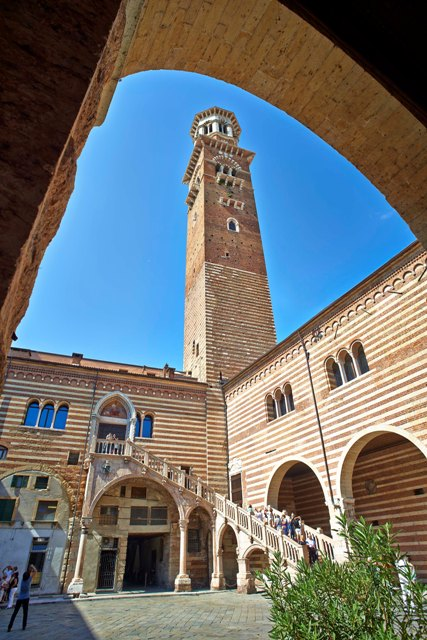 Scala della Ragione e Torre dei Lamberti in Palazzo della Ragione a Verona